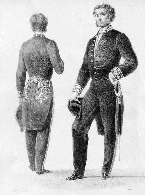 illustrazione recante l'uniforme originaria del prefetto italiano (fine XIX secolo